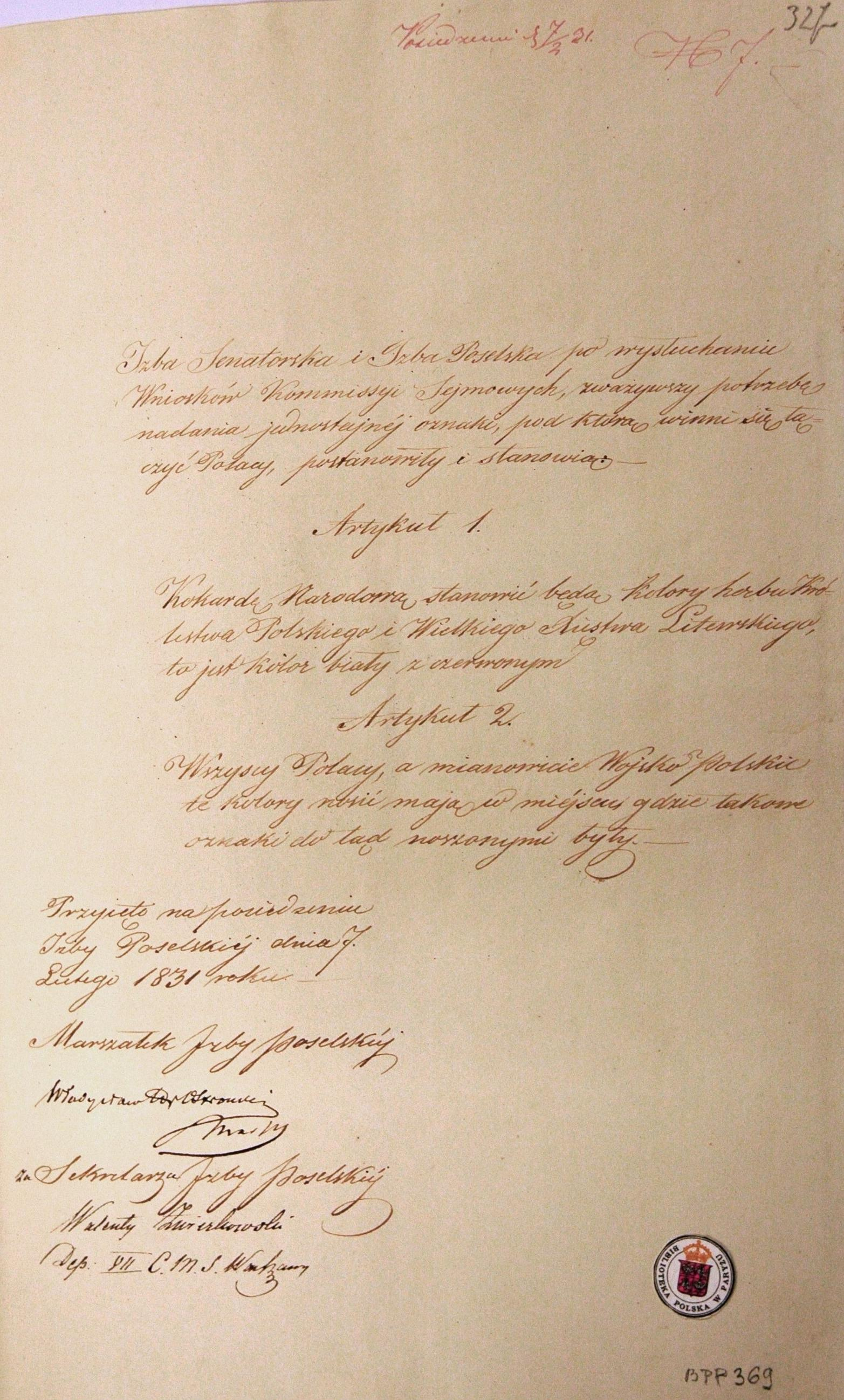 Uchwała Sejmu Królestwa Polskiego z 7 lutego 1831 o ustanowieniu Kokardy Narodowej